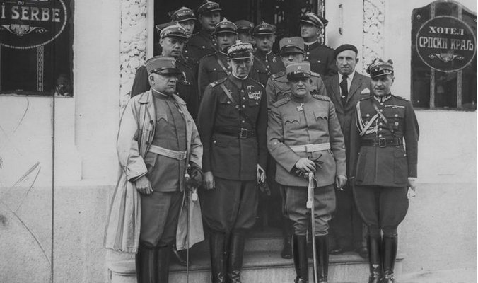 Visita de pilotos polacos a Yugoslavia en 1934. A la izquierda en general Jankovic, en el centro el general polaco Ludomił Rayski y a la derecha el general Milan Nedić.